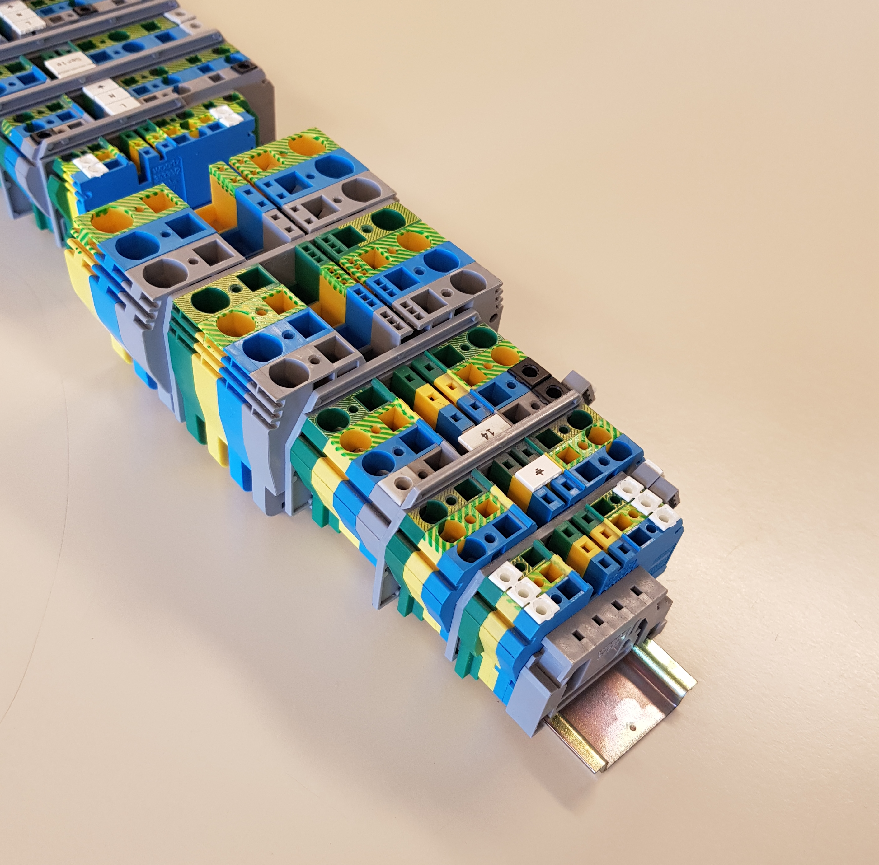 Woertz Federklemmen